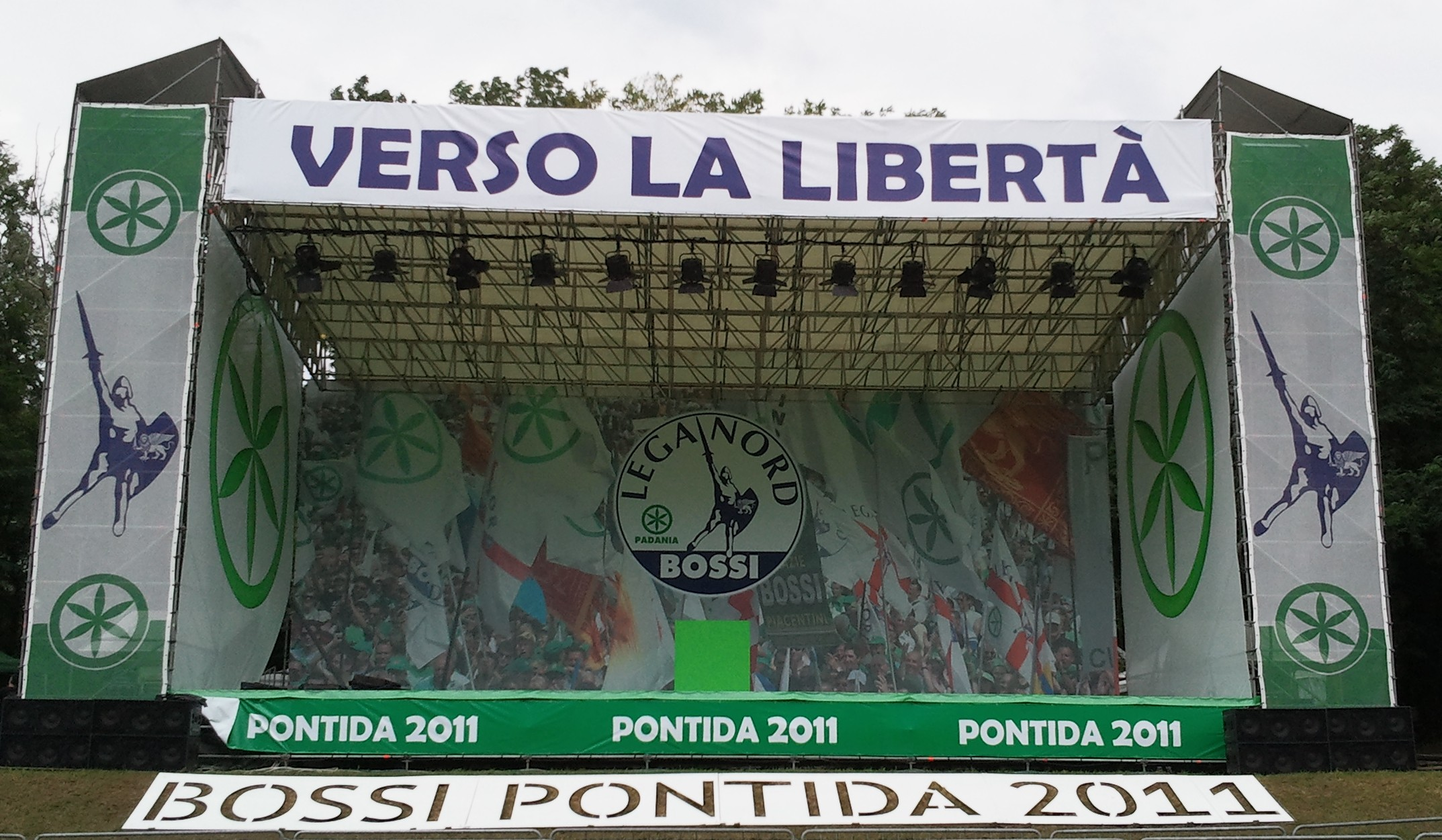 Palco del raduno della Lega Nord a Pontida, il 19 giugno 2011.